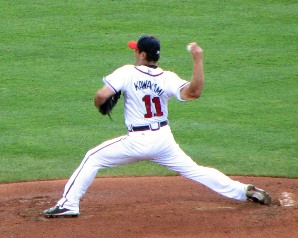 Kenshin Kawakami